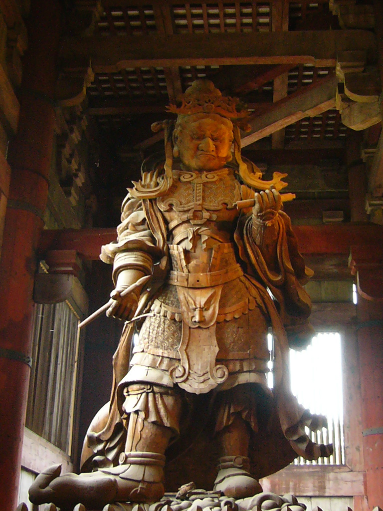 広目天像，江戸時代，木造，東大寺金堂内西北隅（奈良県奈良市）2005年8月13日663highland撮影